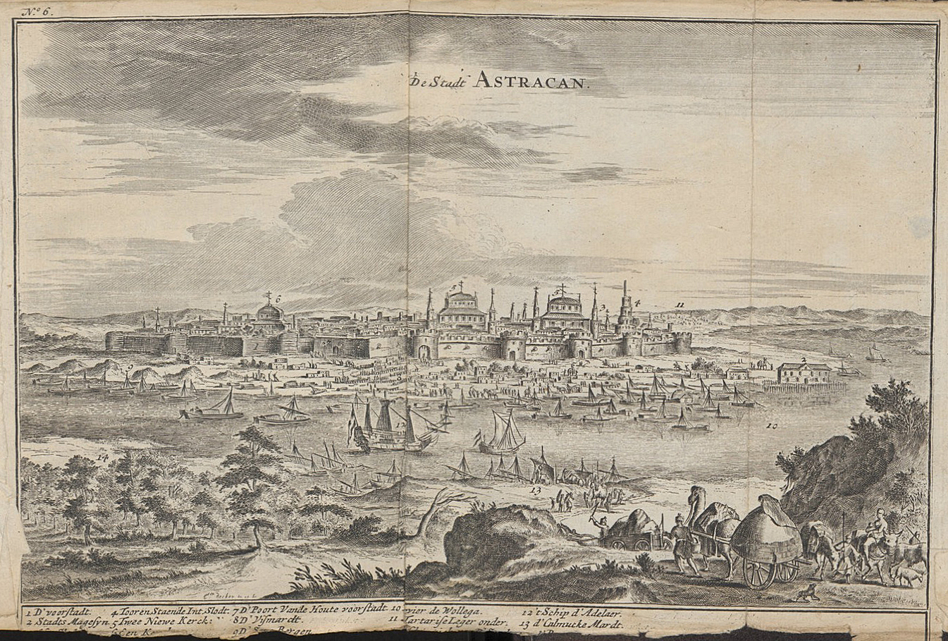 From Jan Janszoon Struys (1746): Drie aanmerkelyke reizen